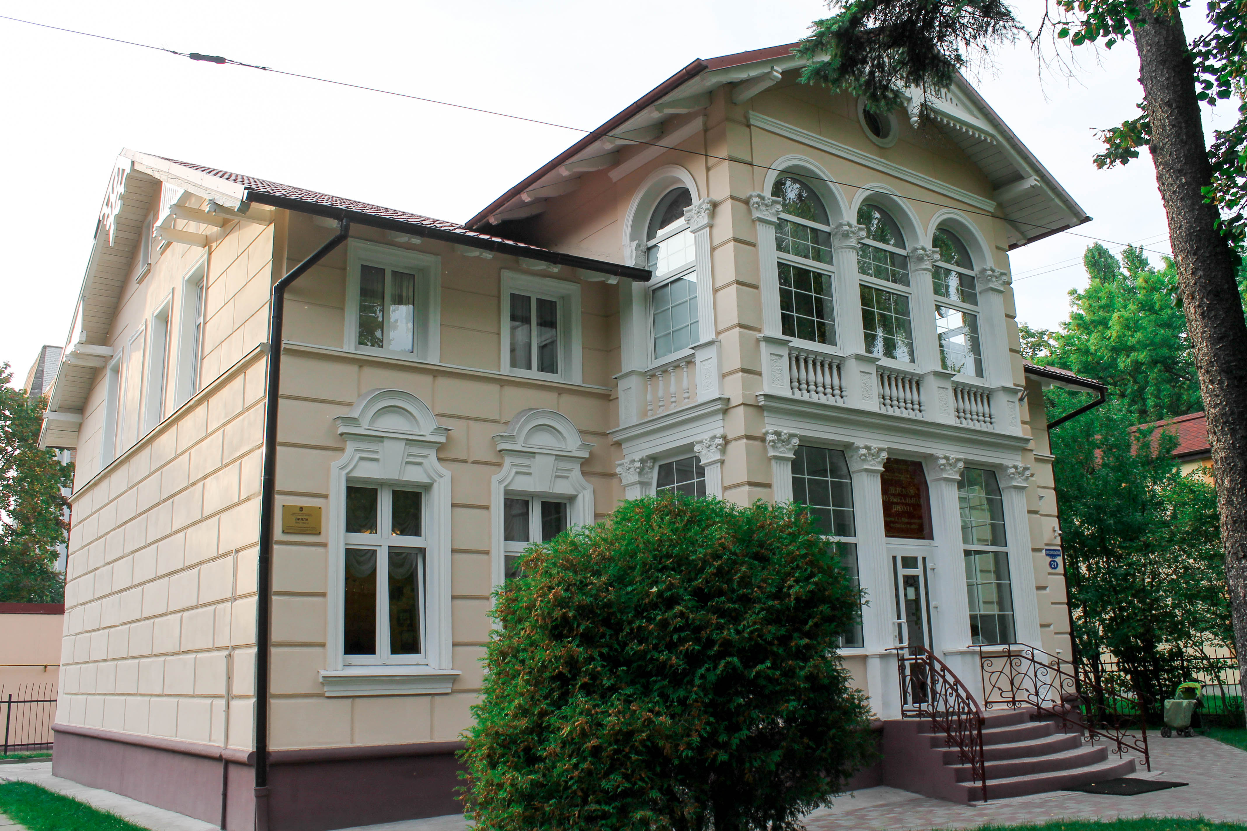 Жилой дом: улица Комсомольская, 21, Калининград, Калининградская область